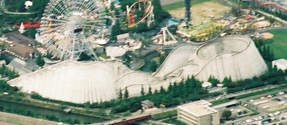 ナガシマスパーランド。 (2006/09/10 In Flight, NH704, JAPAN)